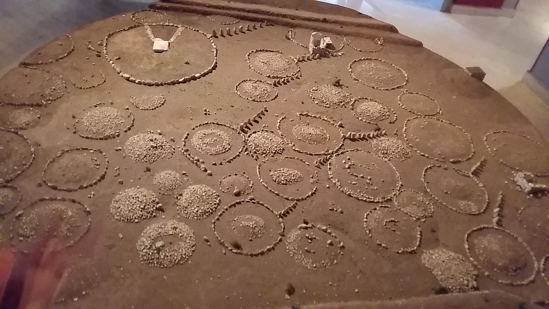 Ricostruzione in scala 1/50 di parte della necropoli di Fossa nel museo "Villa Frigerj" di Chieti